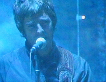 Noel singing "Mucky Fingers".